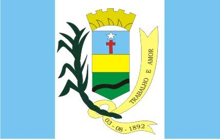 Português do Brasil: Bandeira de Água Preta Pernambuco.